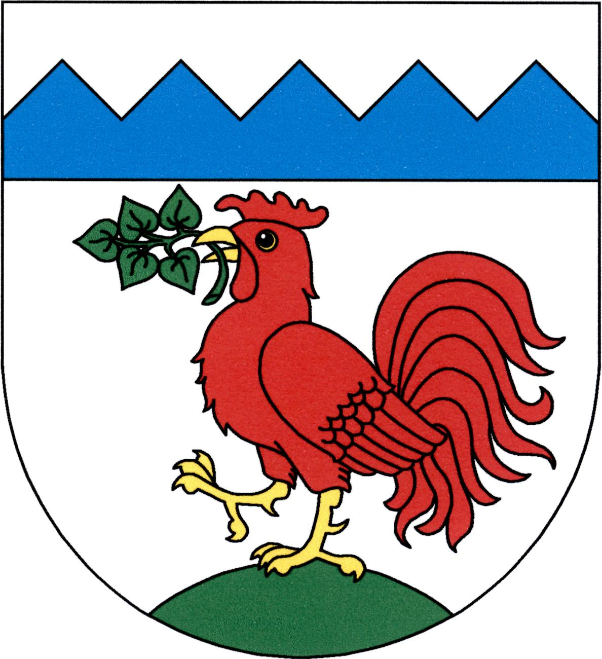 Znak obce Střezimíř